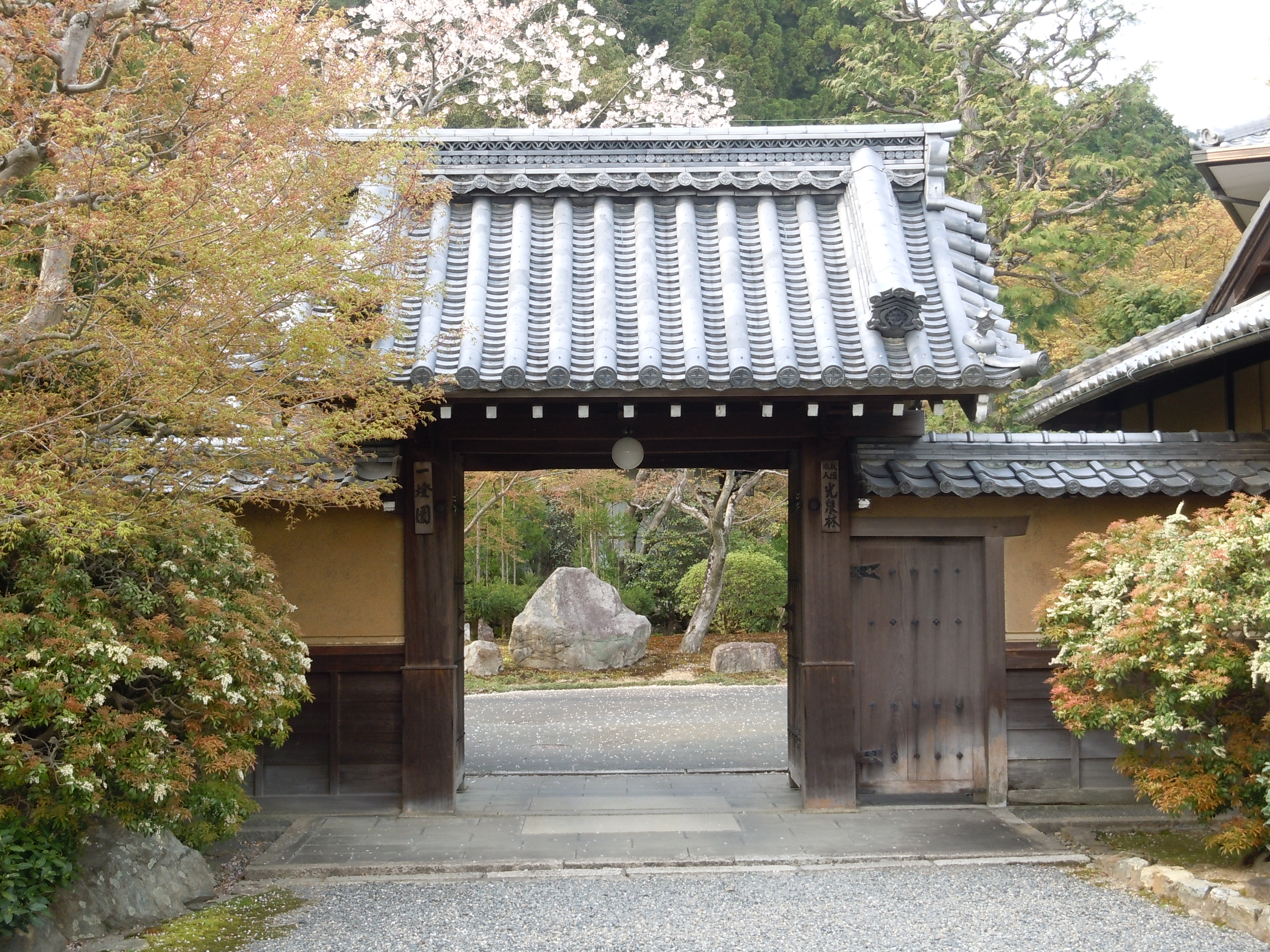 一燈園の入口。山科区にて。